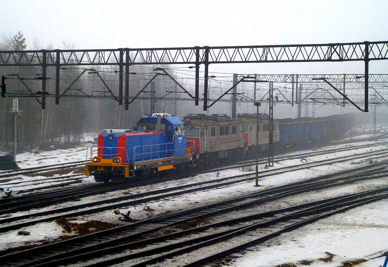 Zmodernizowany spalinowóz 6Dg-164 należący do przedsiębiorstwa Kolprem na stacji Dąbrowa Górnicza Towarowa.